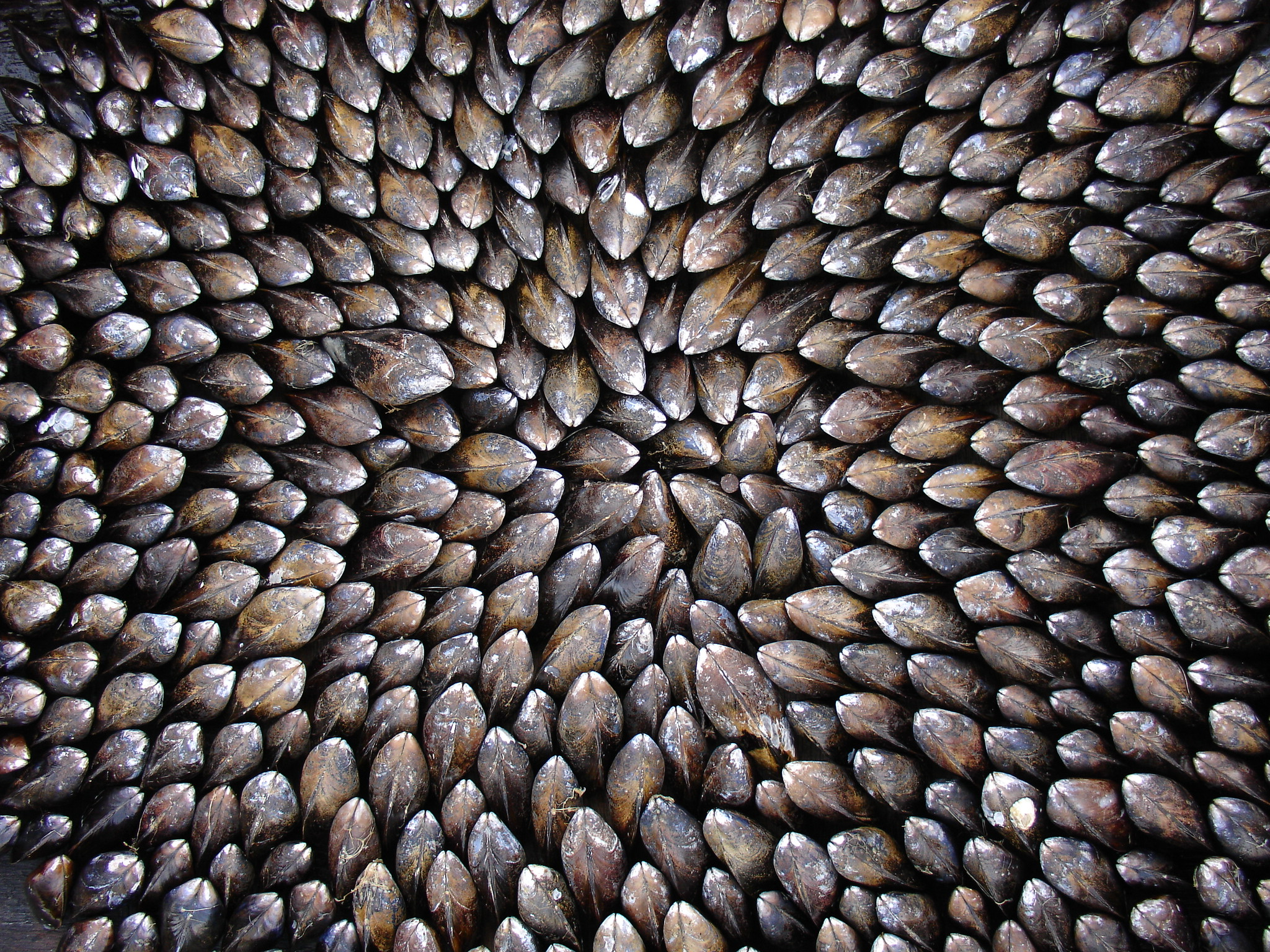 Les moules sont positionnées verticalement sur une planche.